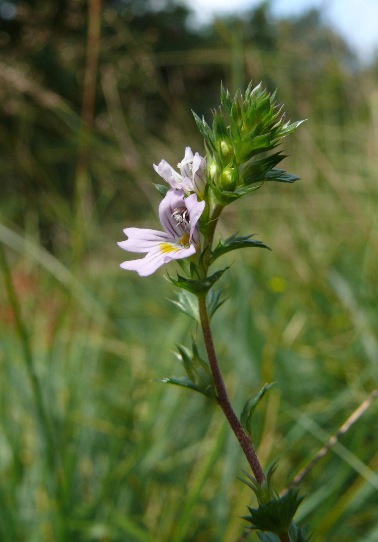 Euphrasia stricta, Mainfranken, Germany